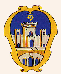 porta s spirito